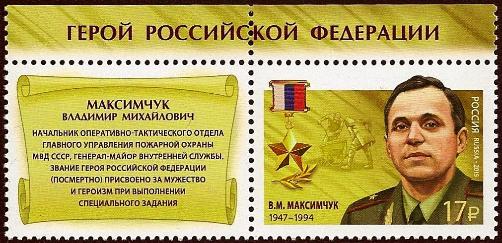 Почтовая марка России 2015 года. Герои РФ. Максимчук В.М.